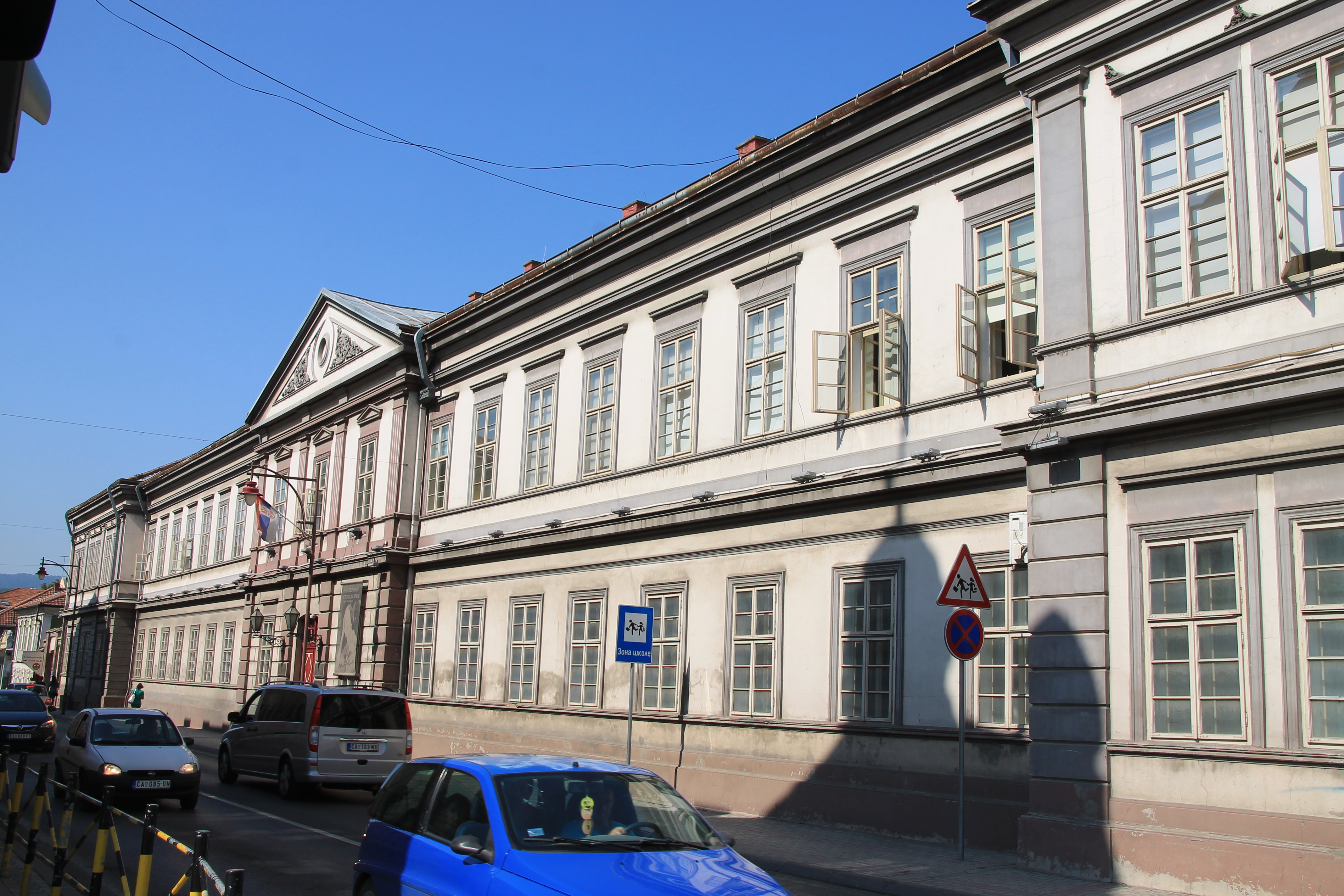 Buildings in Čačak